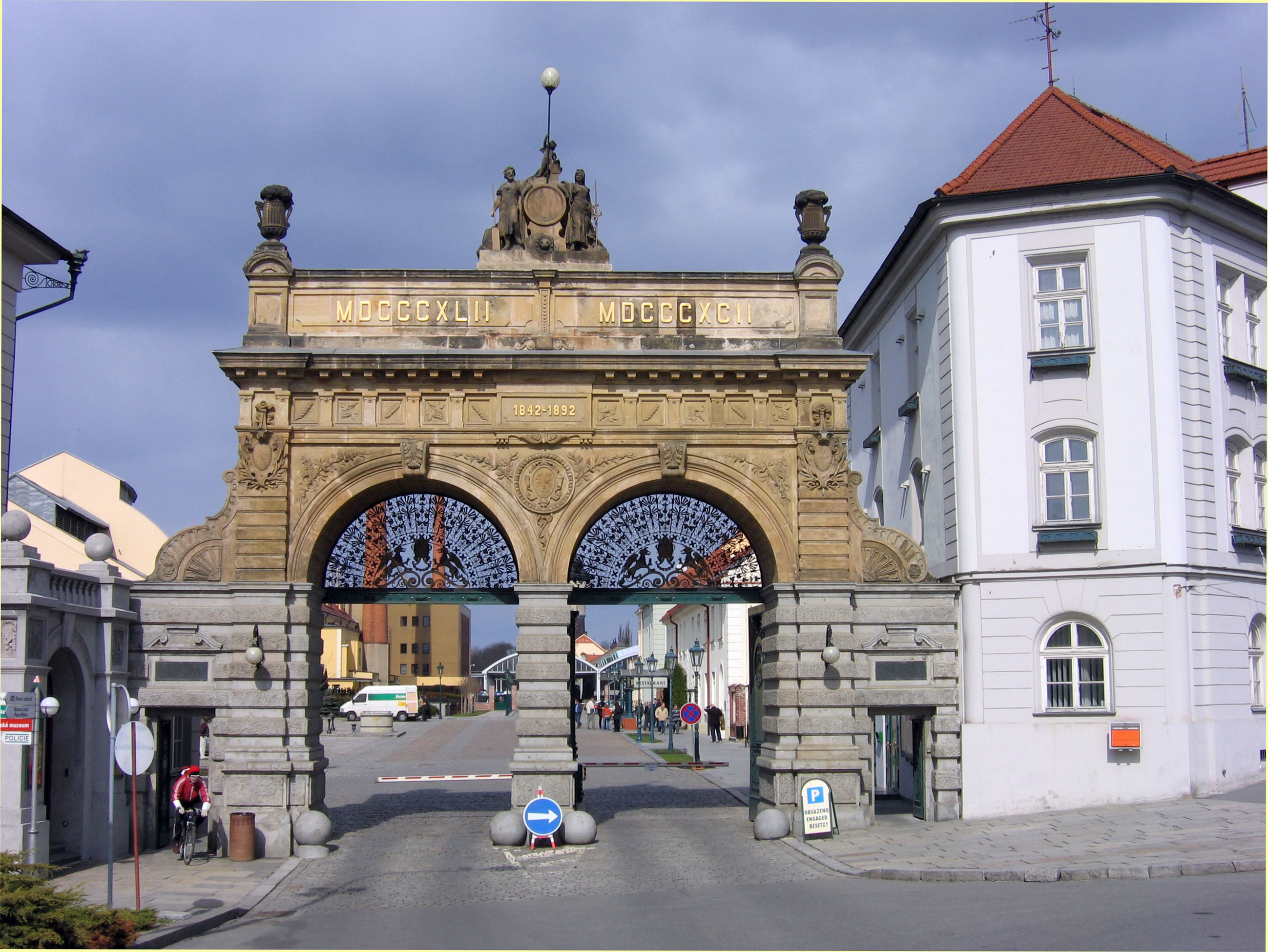 Paart vun der Brauerei zu Pilsen